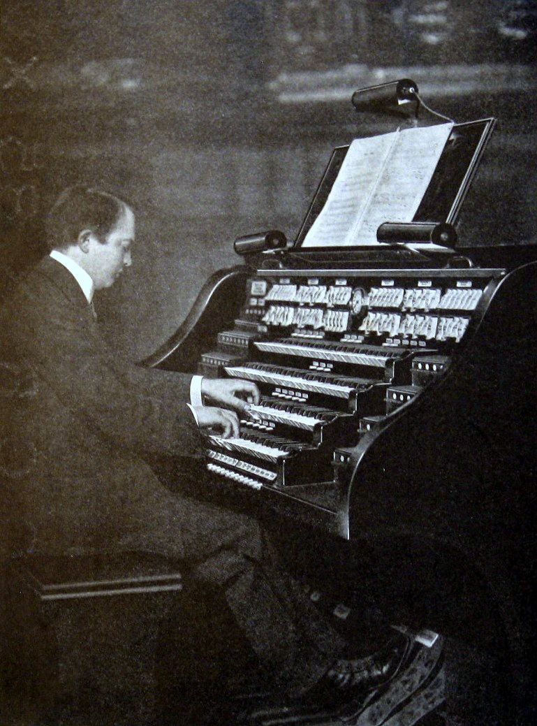 Antalffy-Zsiross Dezső az orgonánál